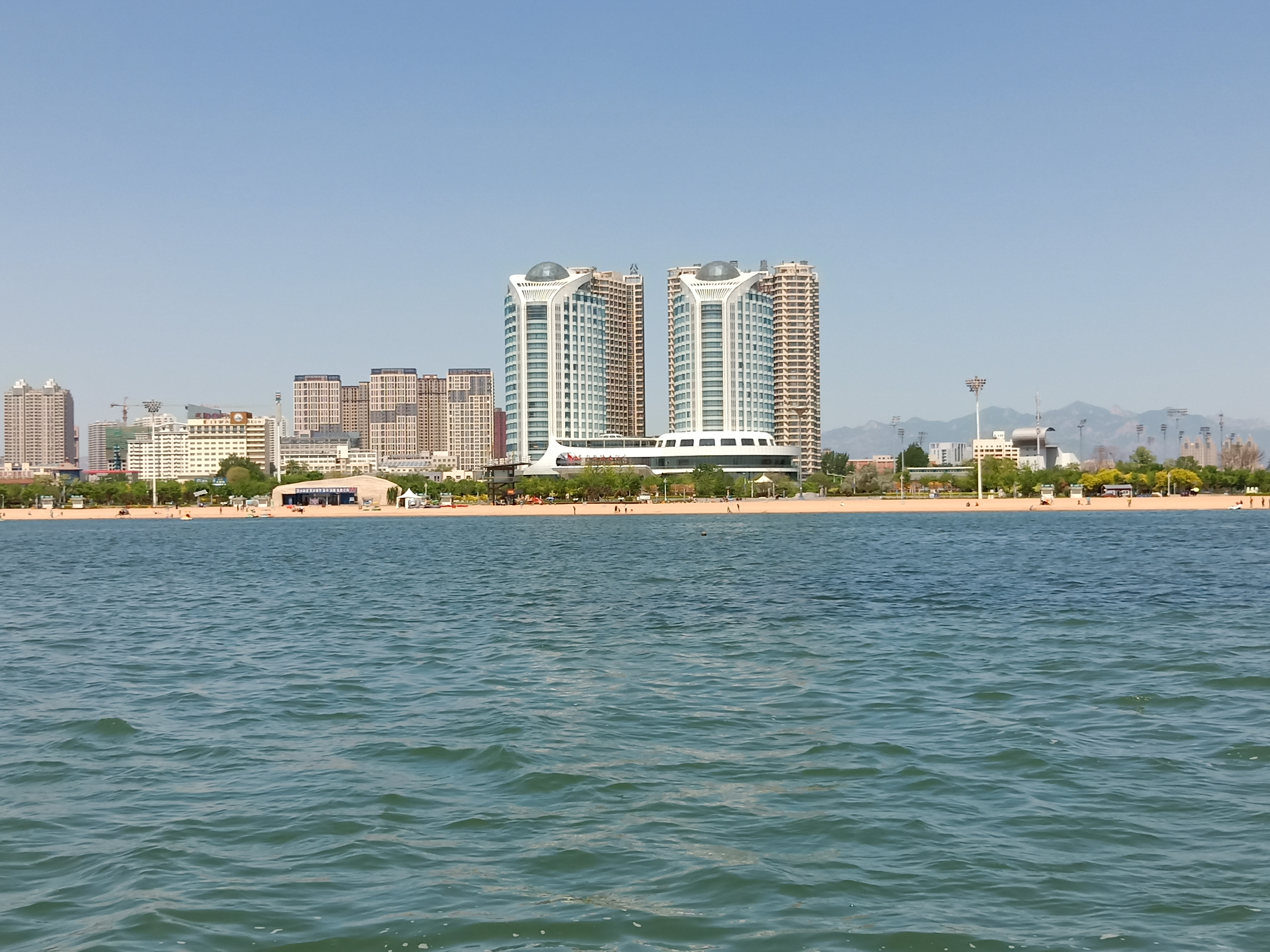 粵語: 喺渤海上邊望去秦皇國際大酒店嗰頭